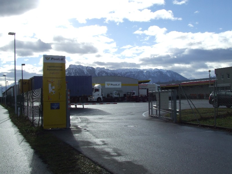 Briefzentrum (Österreich) in Wals-Siezenheim bei Salzburg (Stadt), hier befindet sich das Volunteercenter für den EM2008-Standort Salzburg (zu erkennen auf dem gelben Schild ist ein blauer Hinweis)